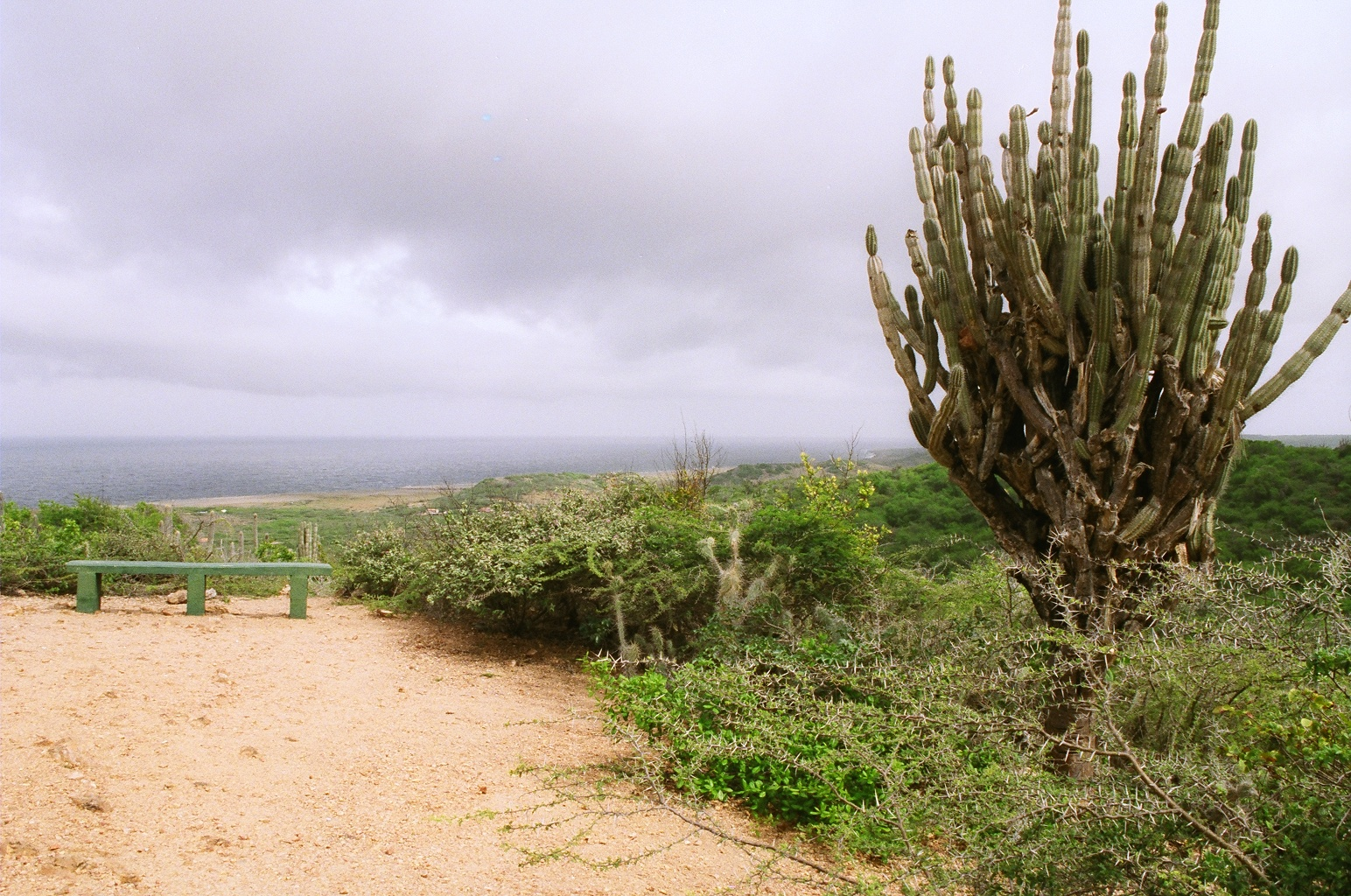 eigen werk